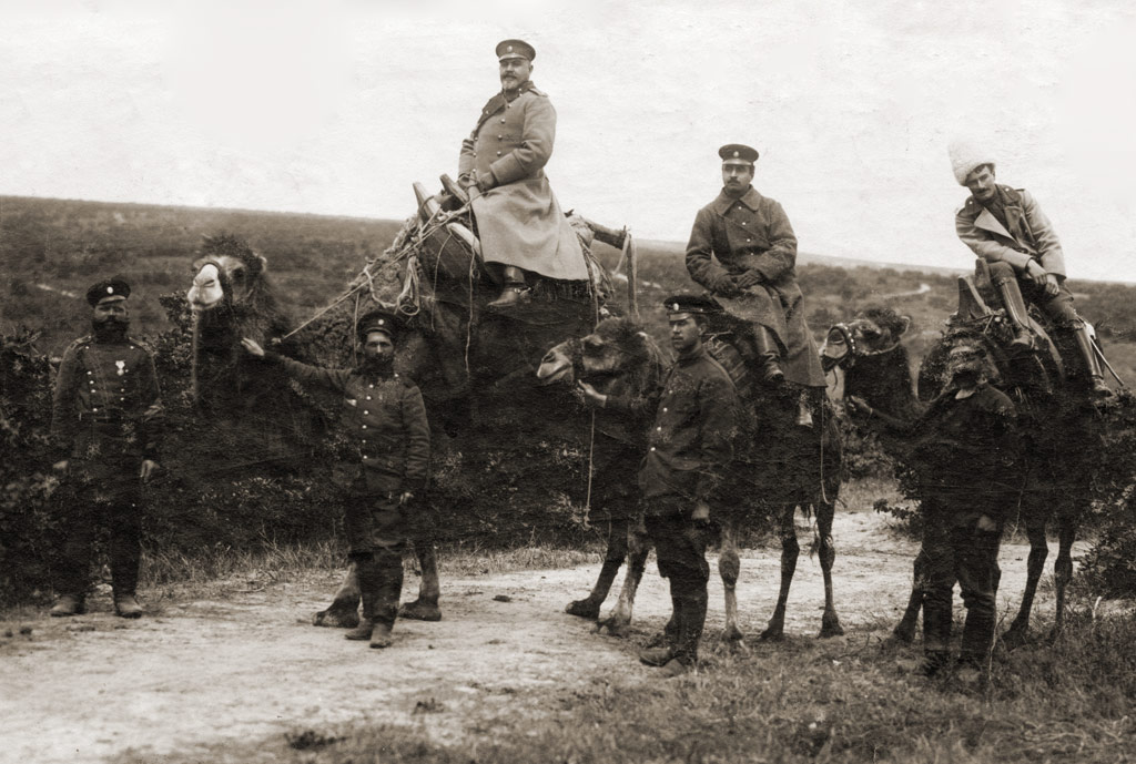 Kliment Boyadzhiev